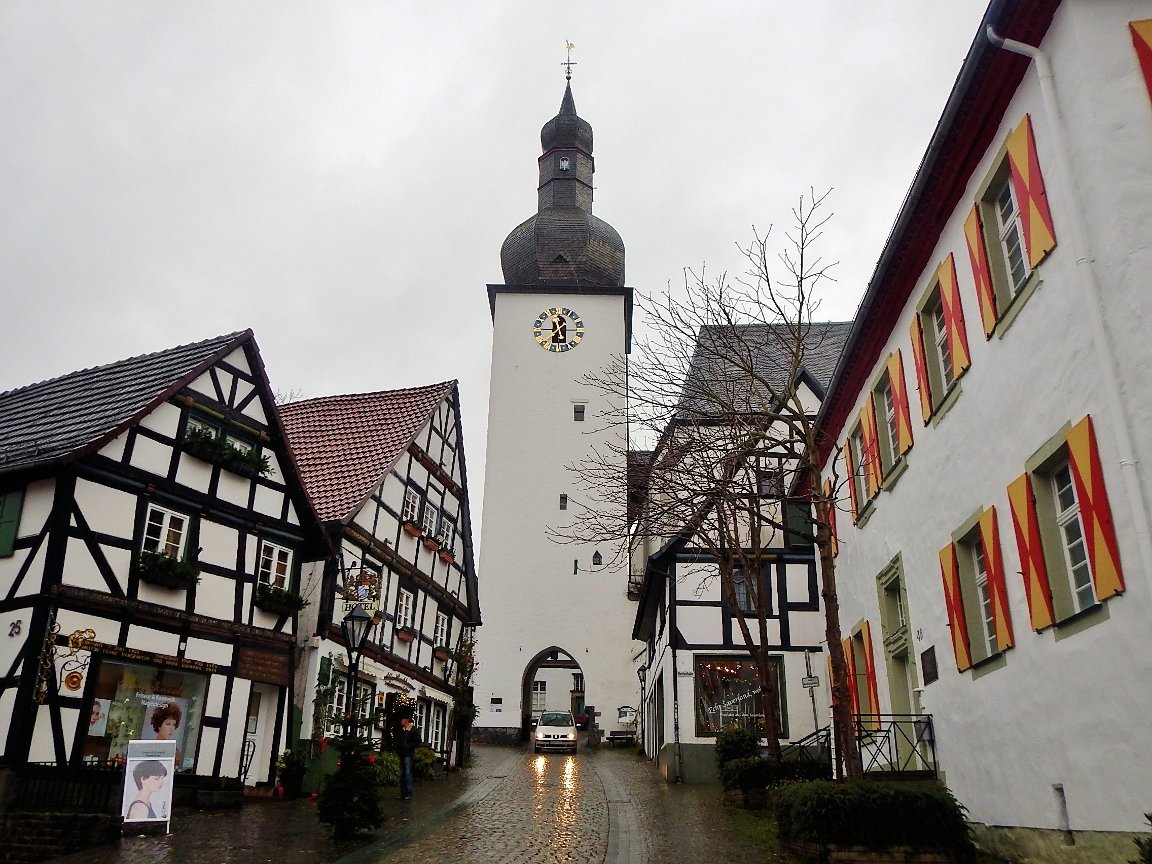 Glockenturm, 44,2 m hoch, aus dem 12./13. Jh. mit barock-bauchiger Doppelzwiebelhaube von 1710